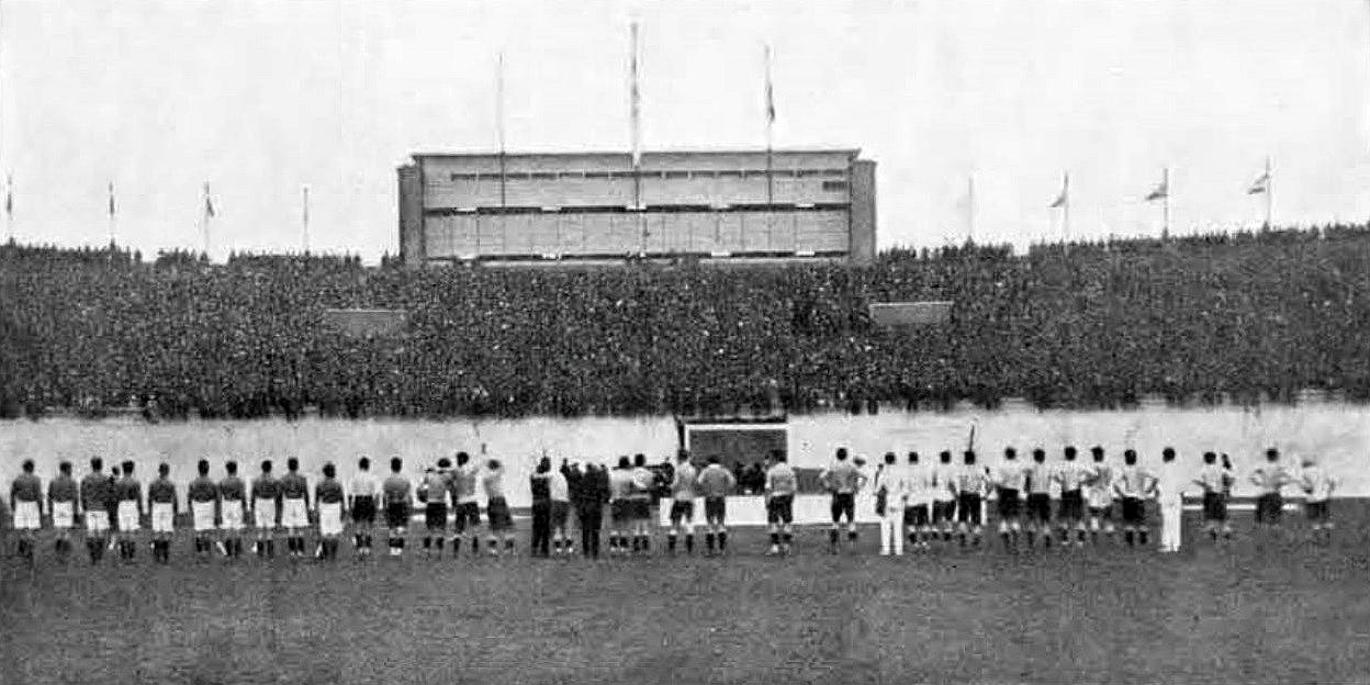 Cérémonie protocolaire de football aux JO 1928 (G. à D. italiens, uruguayens et argentins).